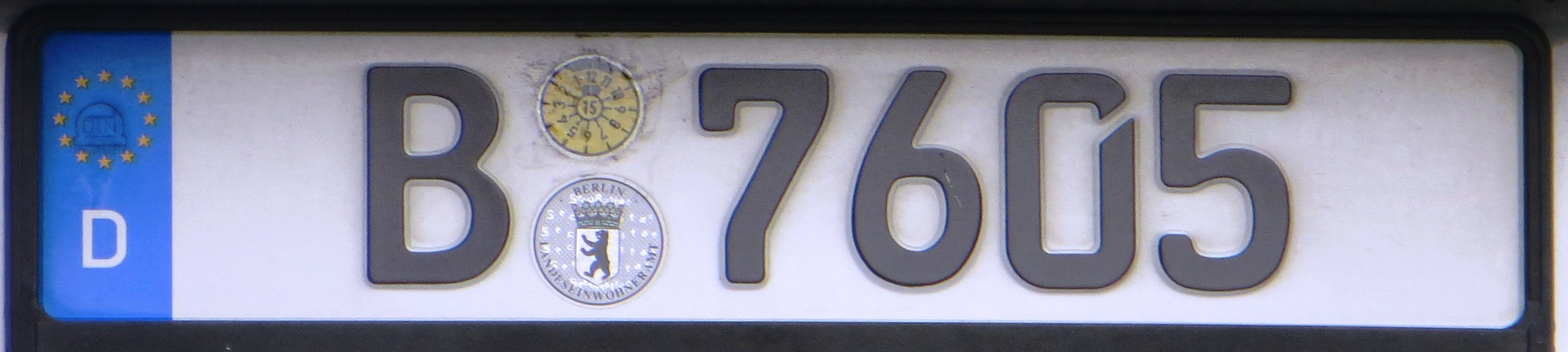 Politie kentekenplaat Berlijn Duitsland